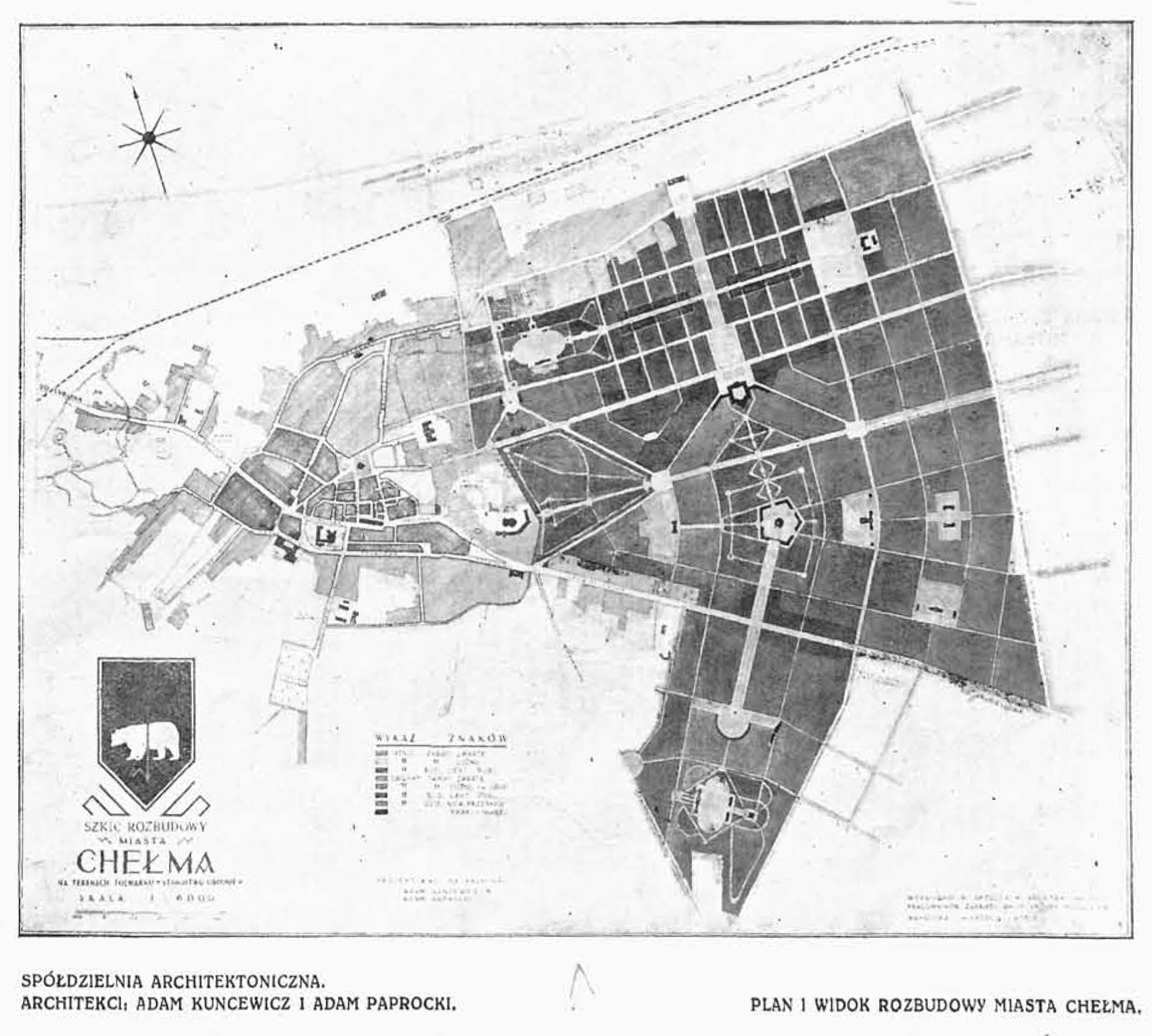 Rok publikacji: 1926; Tytuł: Architektura i Budownictwo 1926 nr 6-7/12; red. Wóycicki, Zygmunt. Red.; Data wydania oryg.: 1926; Warszawa: [s. n.] (Warszawa: Zakłady Graficzne B. Wierzbicki i S-ka); w zbiorach Biblioteki Cyfrowej PolitechnikiŚląskiej - oai: :19269 - zasób dostępny bez ograniczeń: [dostęp: 08.10.2014]